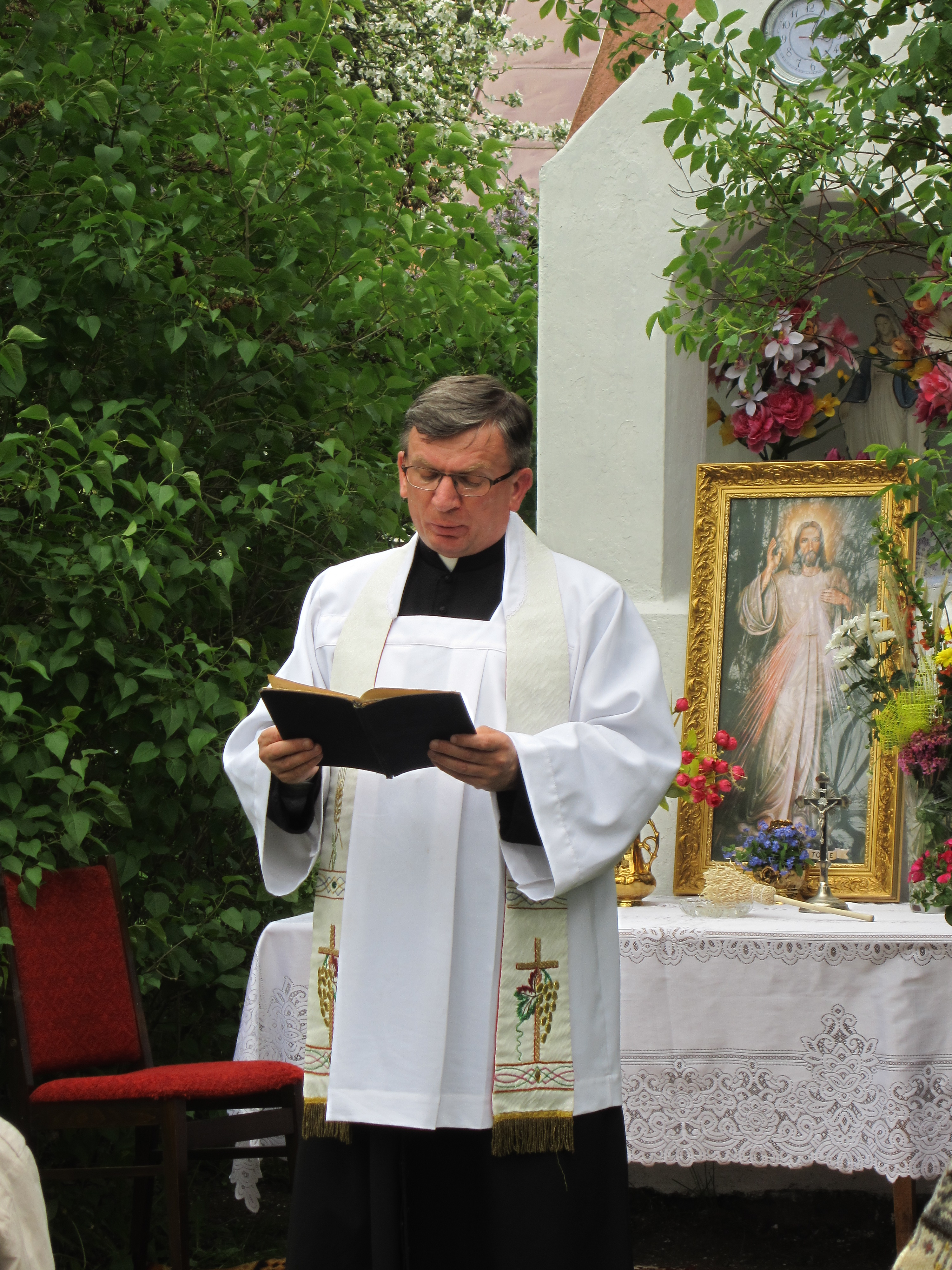 Ksiądz Krzysztof Pawelec